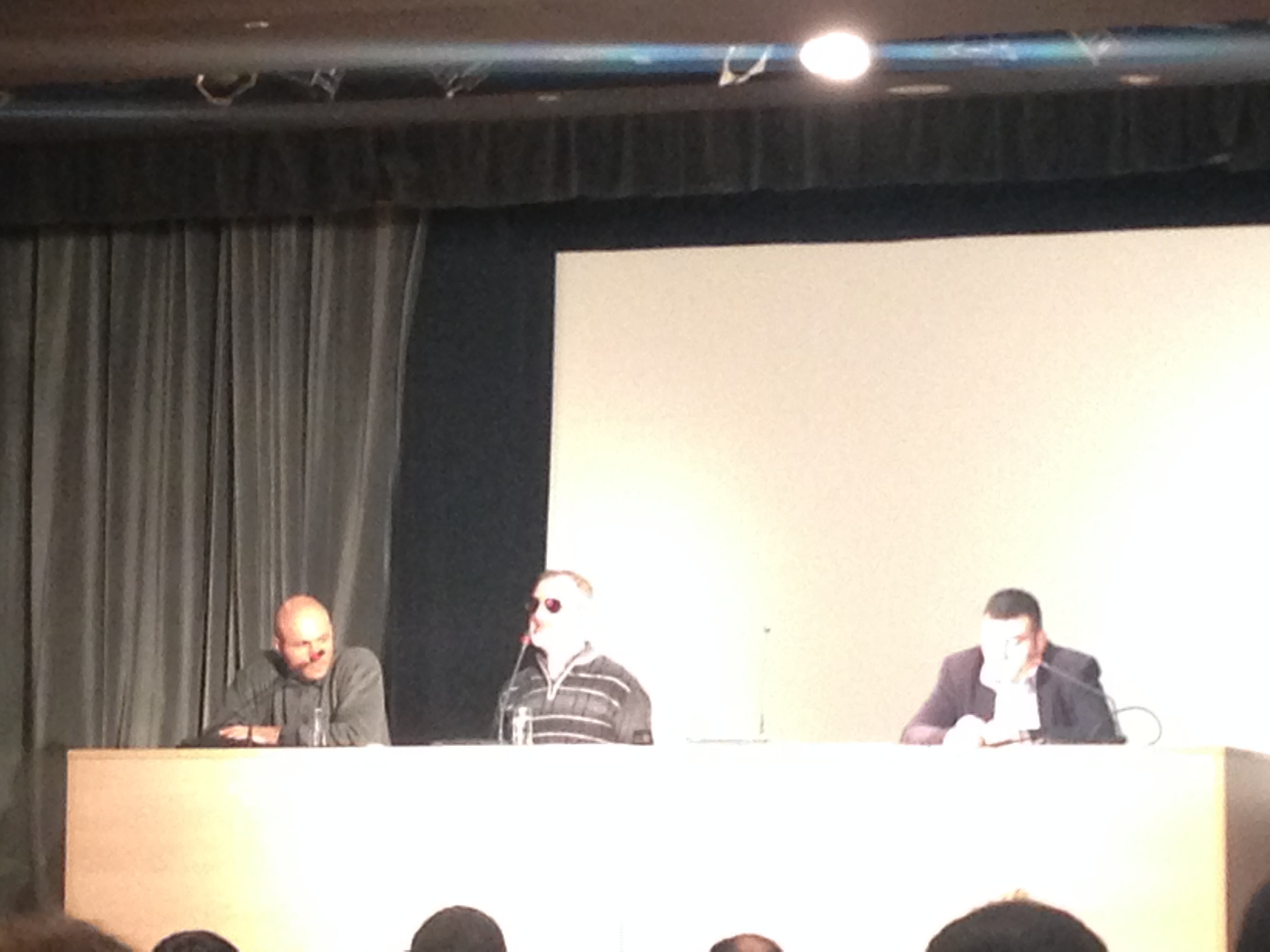 Հանդիպում Ալեք Ենիգոմշյանի հետ: Մոսկվա, 2014 թվականի հունվարի 25